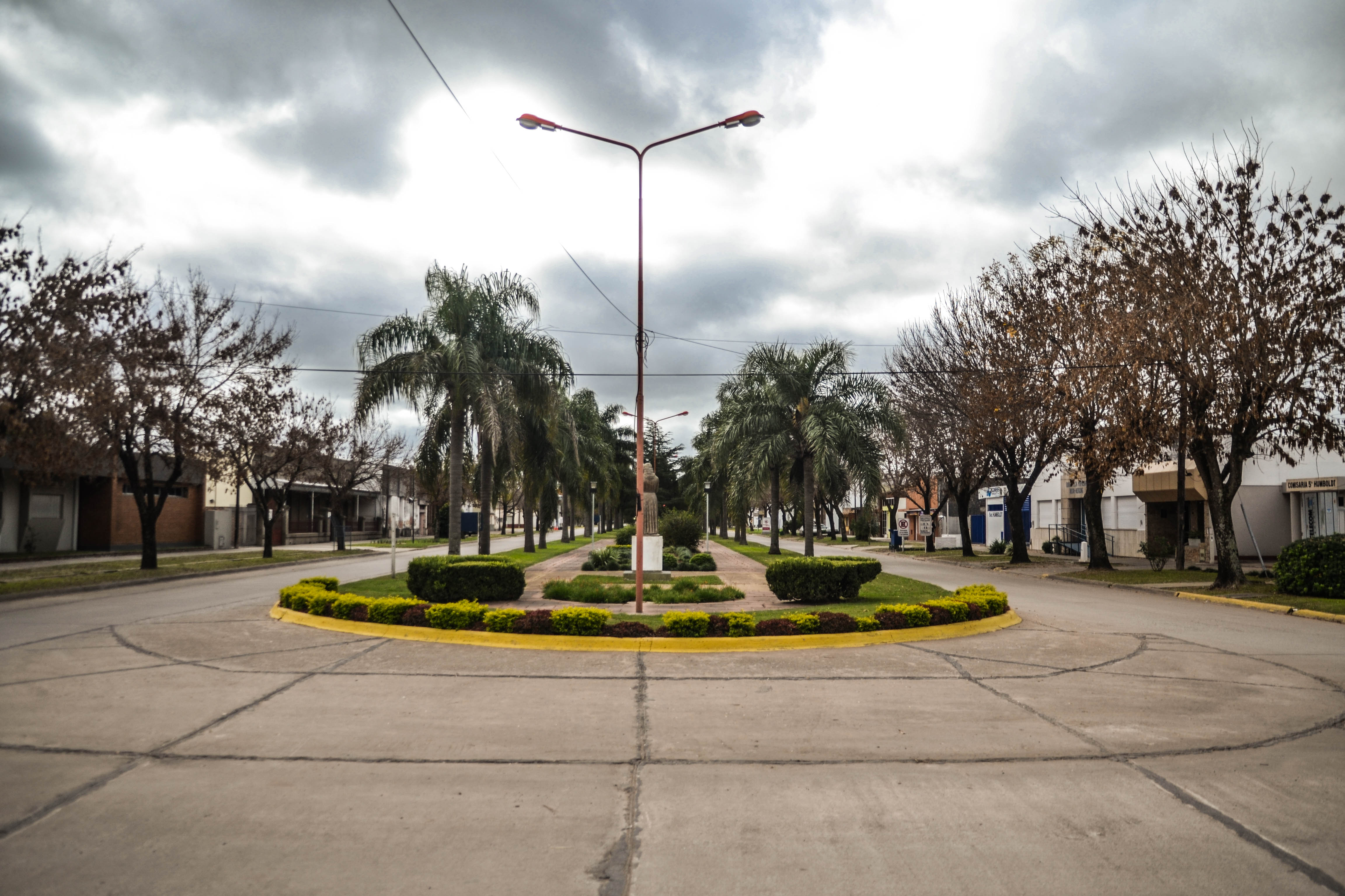 Avenida principal - Comuna de Humboldt (Santa Fe)